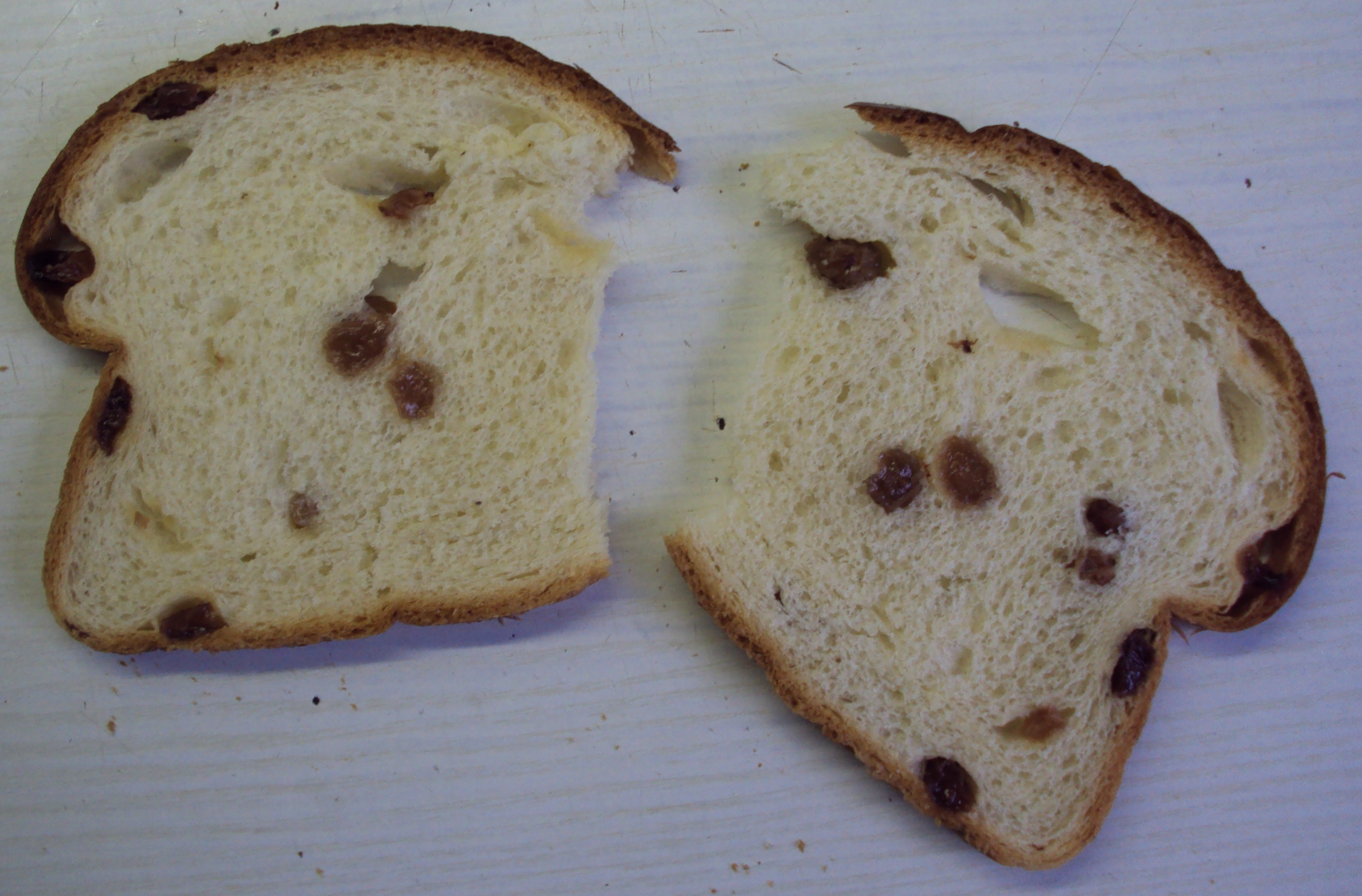 Sneetje rozijnenbrood